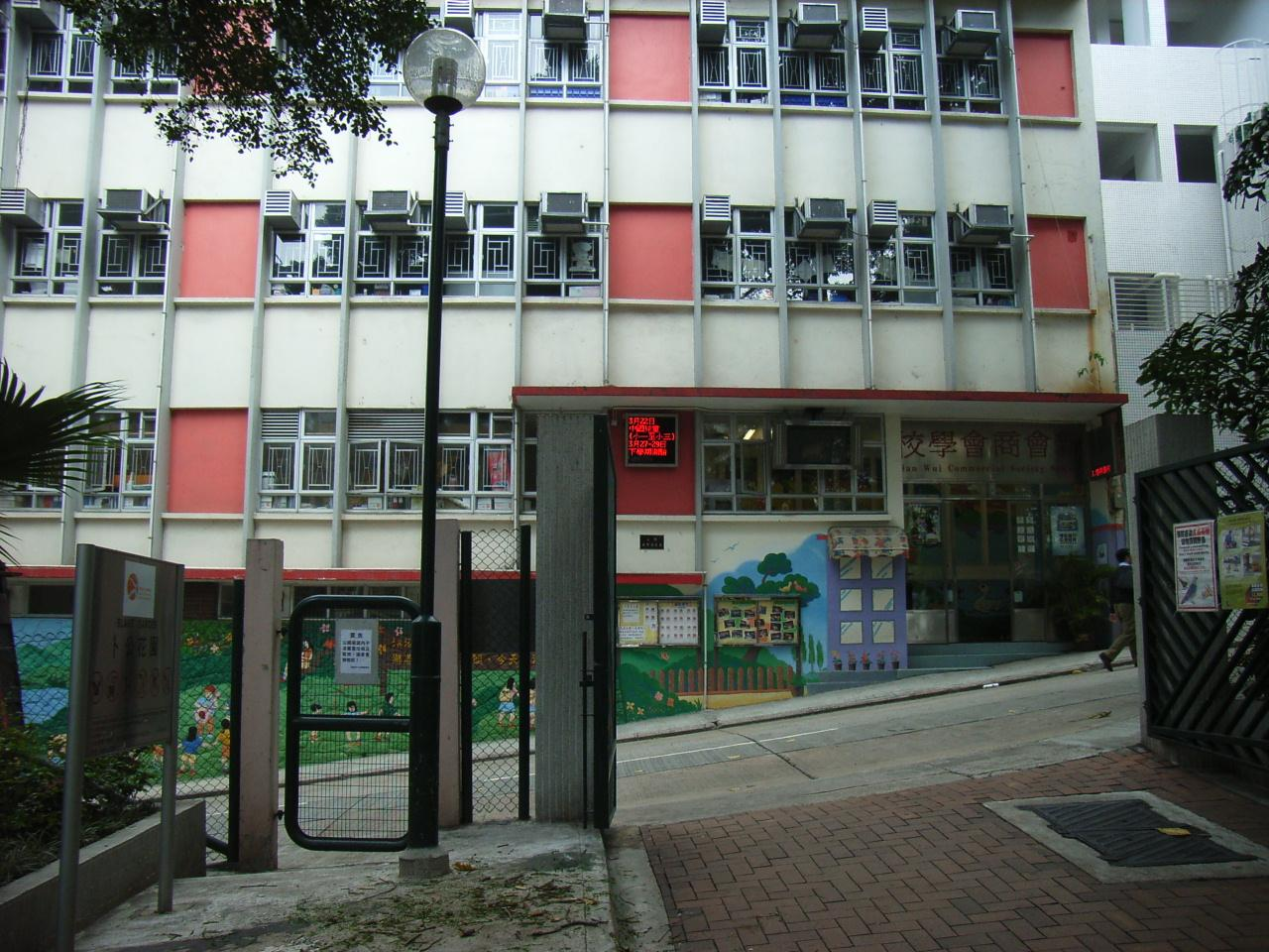 香港zh:上環zh:普仁坊zh:卜公花園, Sheung Wan, Hong Kong